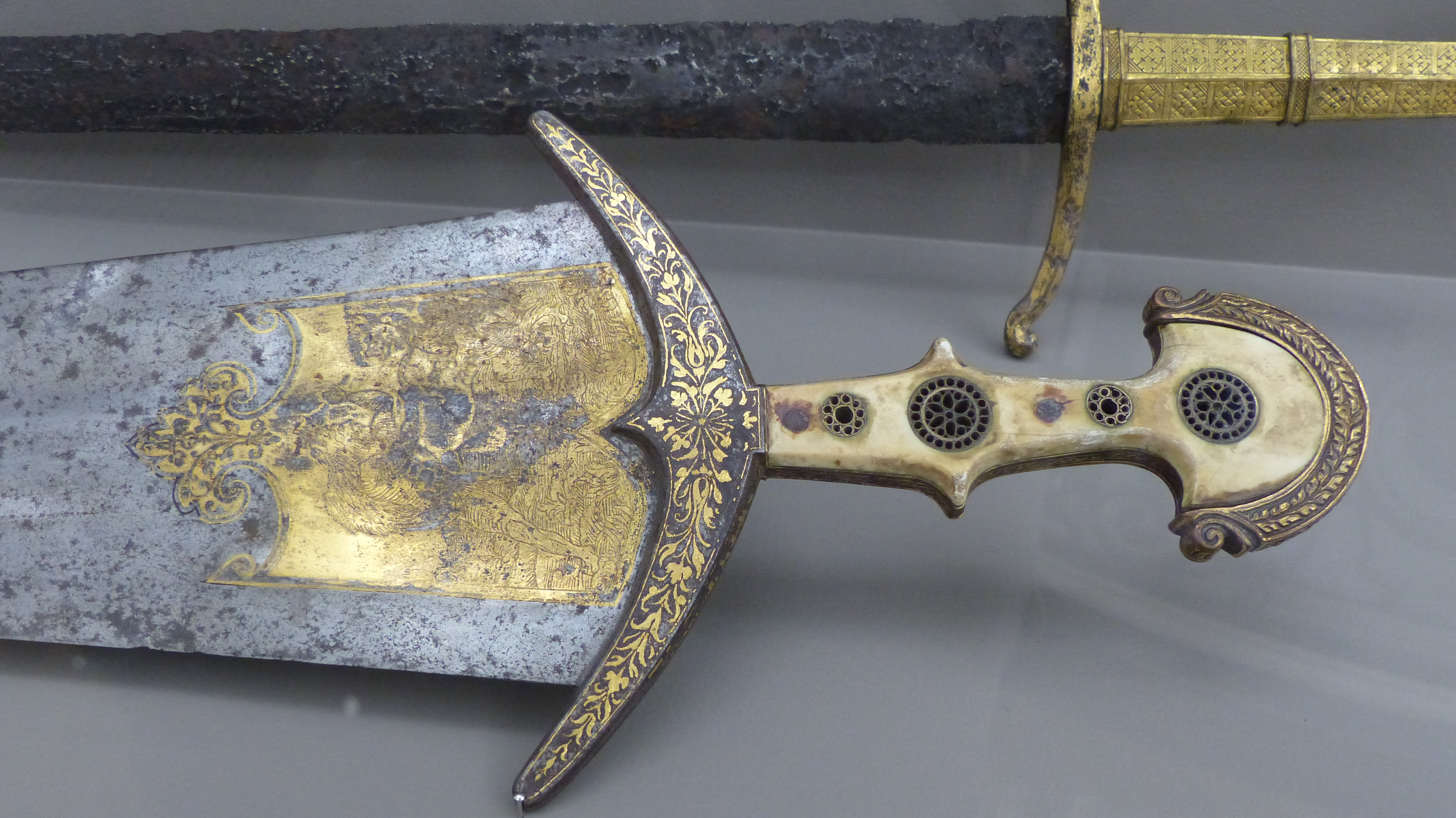 Nîmes (Gard, France), musée des Beaux-Arts; panoplie d'armes blanches d'Edmond Foulc : cinquedea (Italie du nord, vers 1500), fer, bronze et plaques d'ivoire. Legs Foulc 1916.